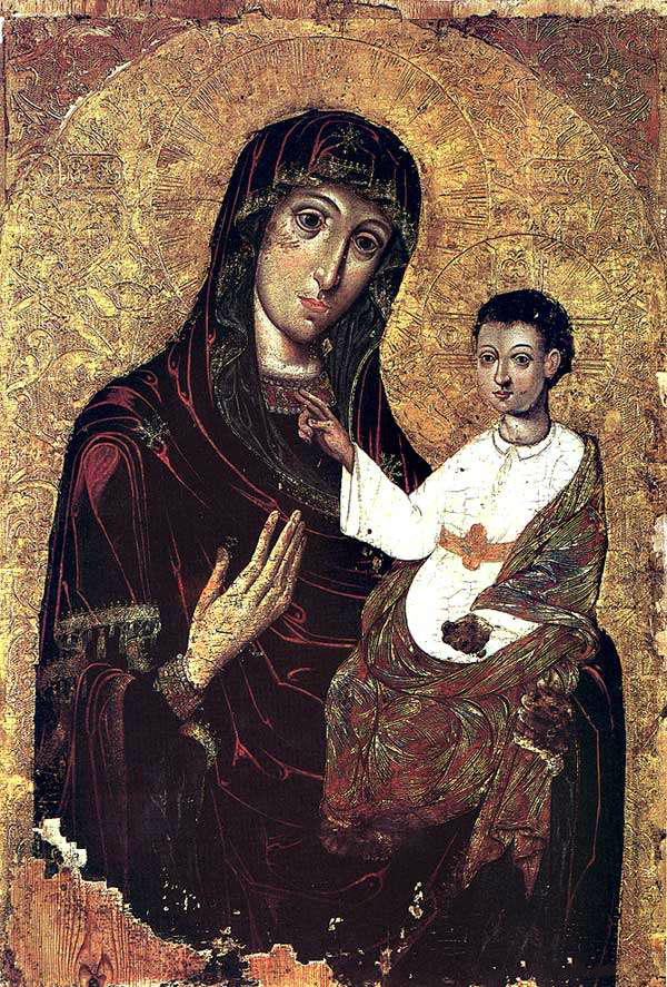 Маці Боская Адзігітрыя Баркалабаўская. 1659. Святатроіцкая царква. Быхаў. Дошка, яечная тэмпера. 125х88,5х3.